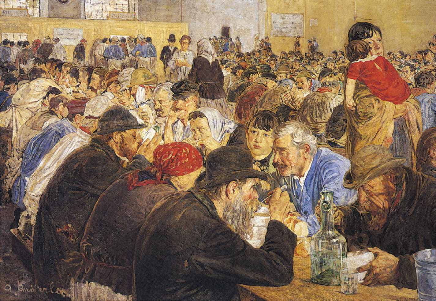 Alle cucine economiche di Porta nuova by Attilio Pusterla, Milano, Galleria d’arte moderna